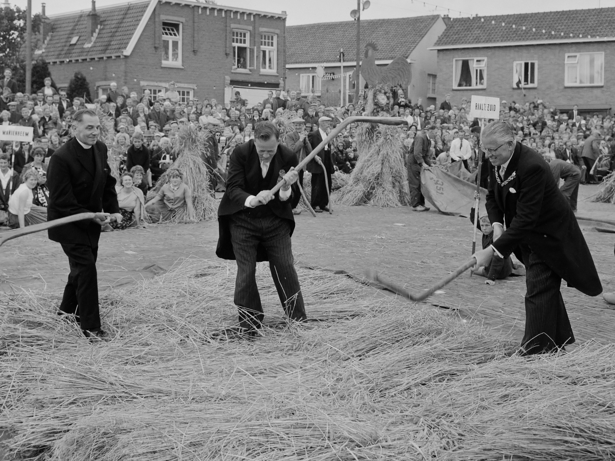 Stoppelhaene (roggeoogstfeest), bindwedstrijd 20 augustus 1964